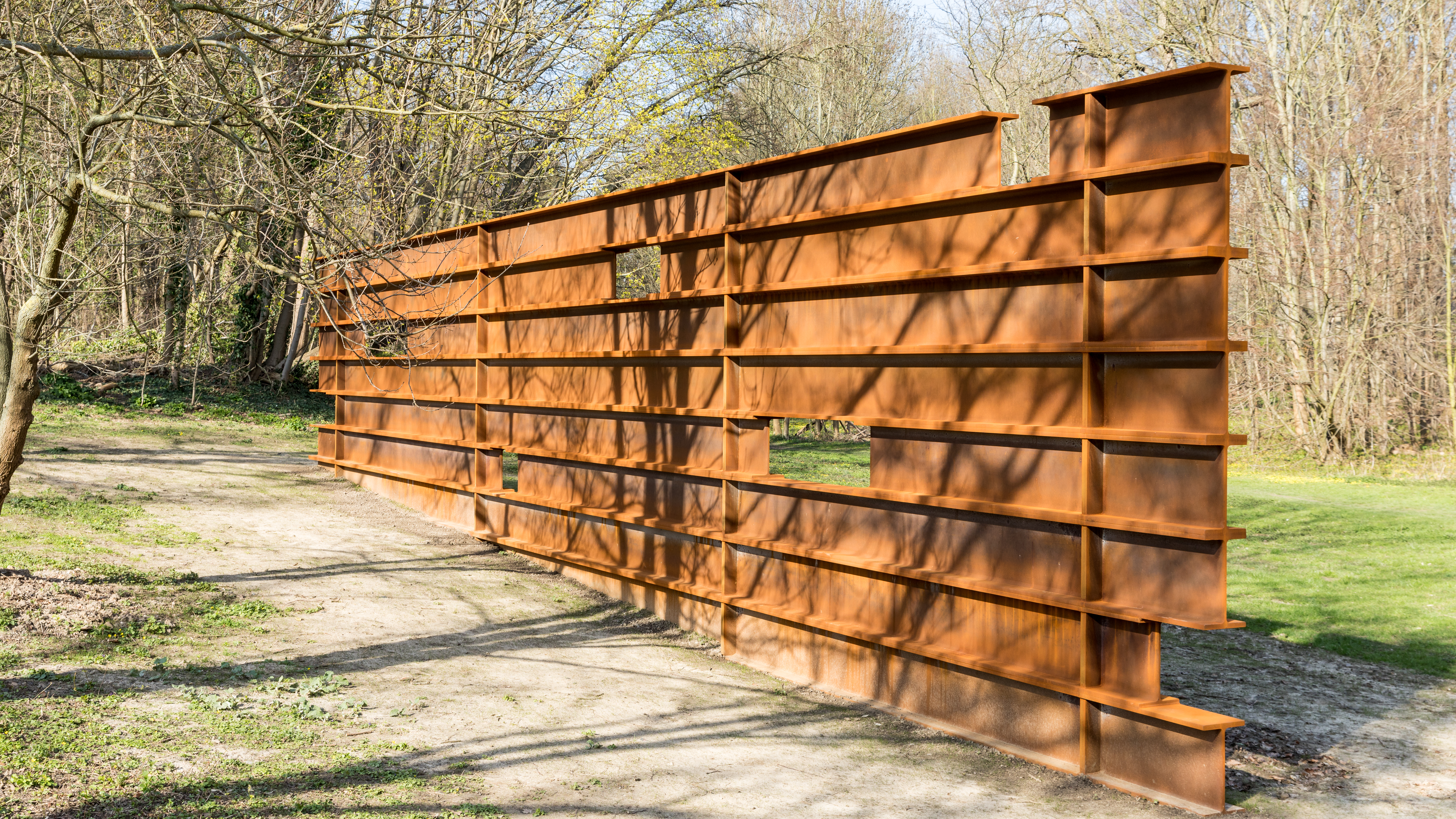 Gedenkort an das Deportationslager Köln-Müngersdorf. Skulptur aus Cortenstrahl nach einem Entwurf des Kölner Architekten Simon Ungers. Posthum errichtet im Januar 2020